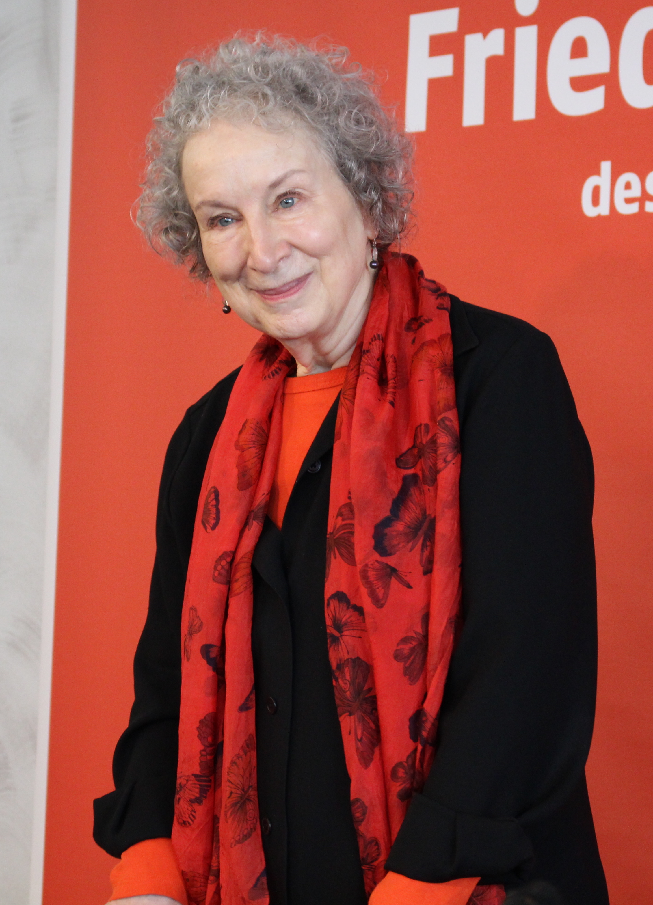 Margaret Atwood - Foire du Livre de Francfort